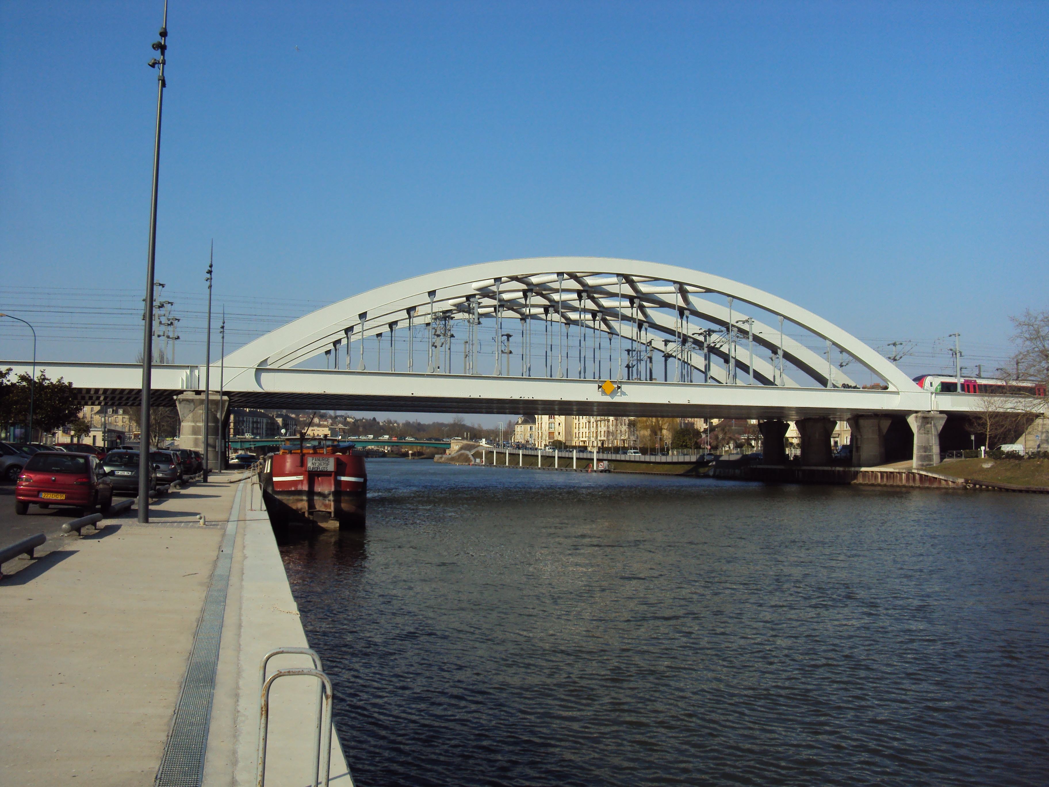 Nouveau pont SNCF de pontoise